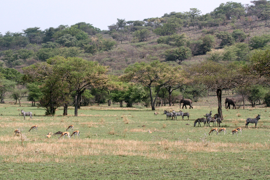 Serengeti